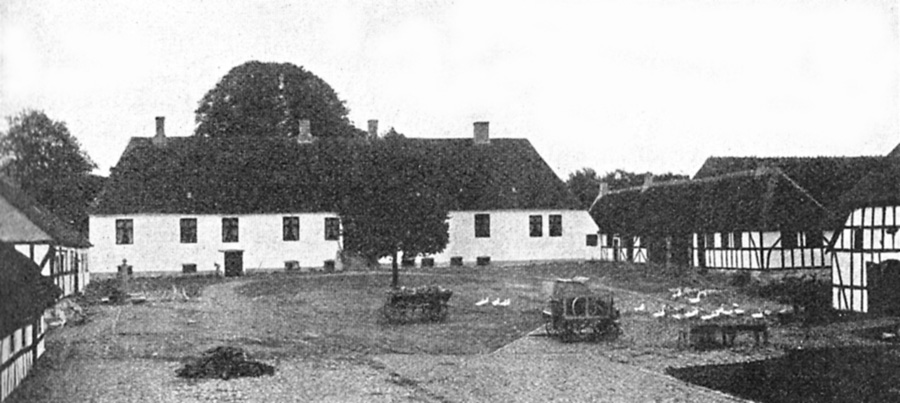 Østergård er en lille herregård fra 1584, som blev kaldt Kiisgaard. Navnet Østergård er fra 1598. Gården ligger i Munkebo Sogn, Bjerge Herred, Munkebo Kommune. Hovedbygningen er opført i 1731.